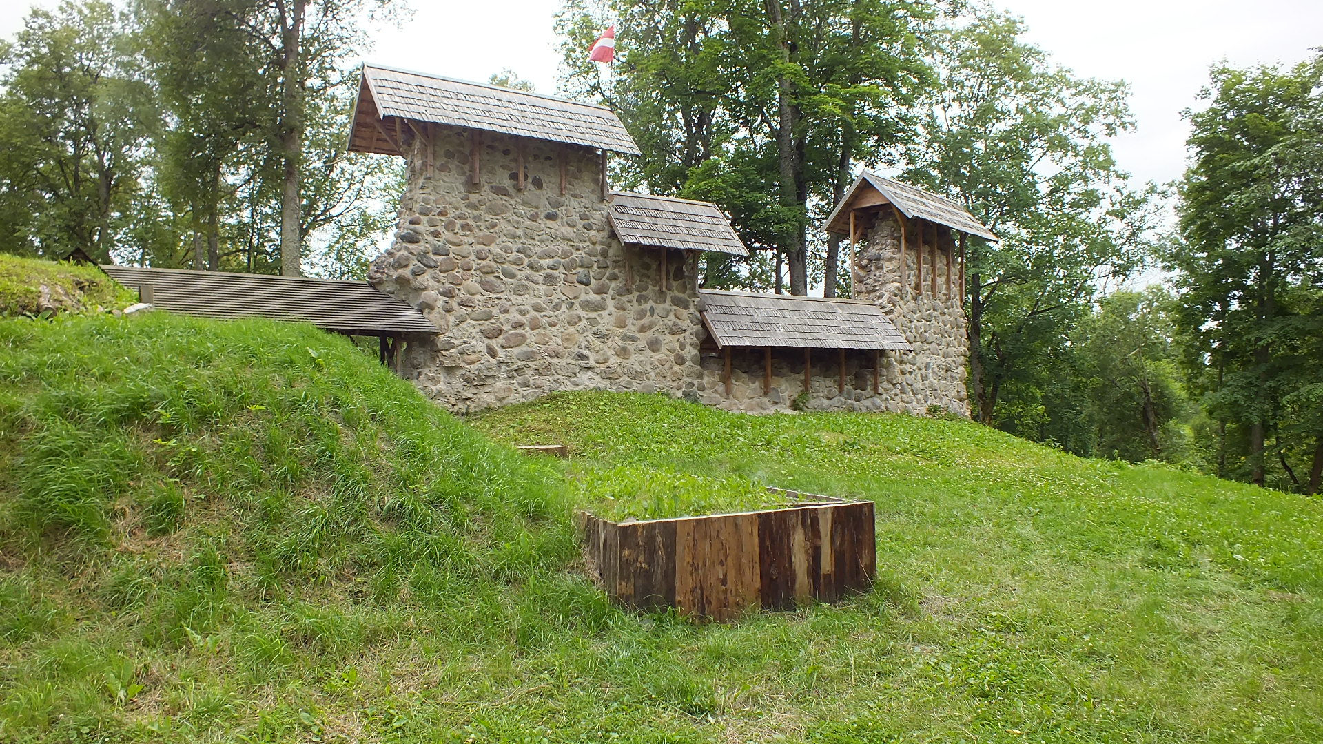 Ropažu viduslaiku pils, Ropaži